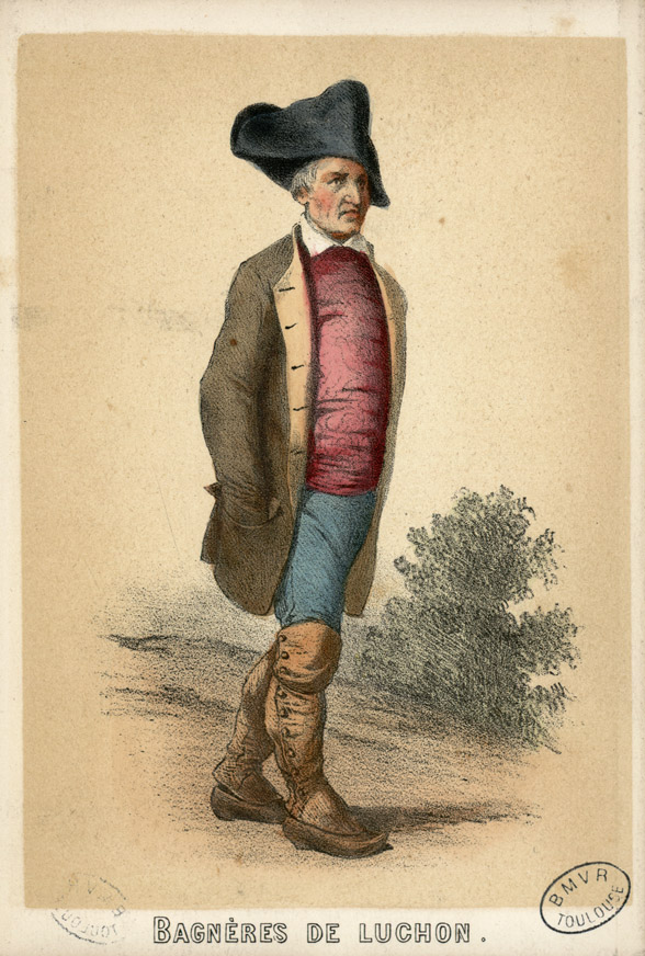 Album dépliant de 25 lithographies aquarellées et gommées Ancely, René (1876 - 1966). Possesseur